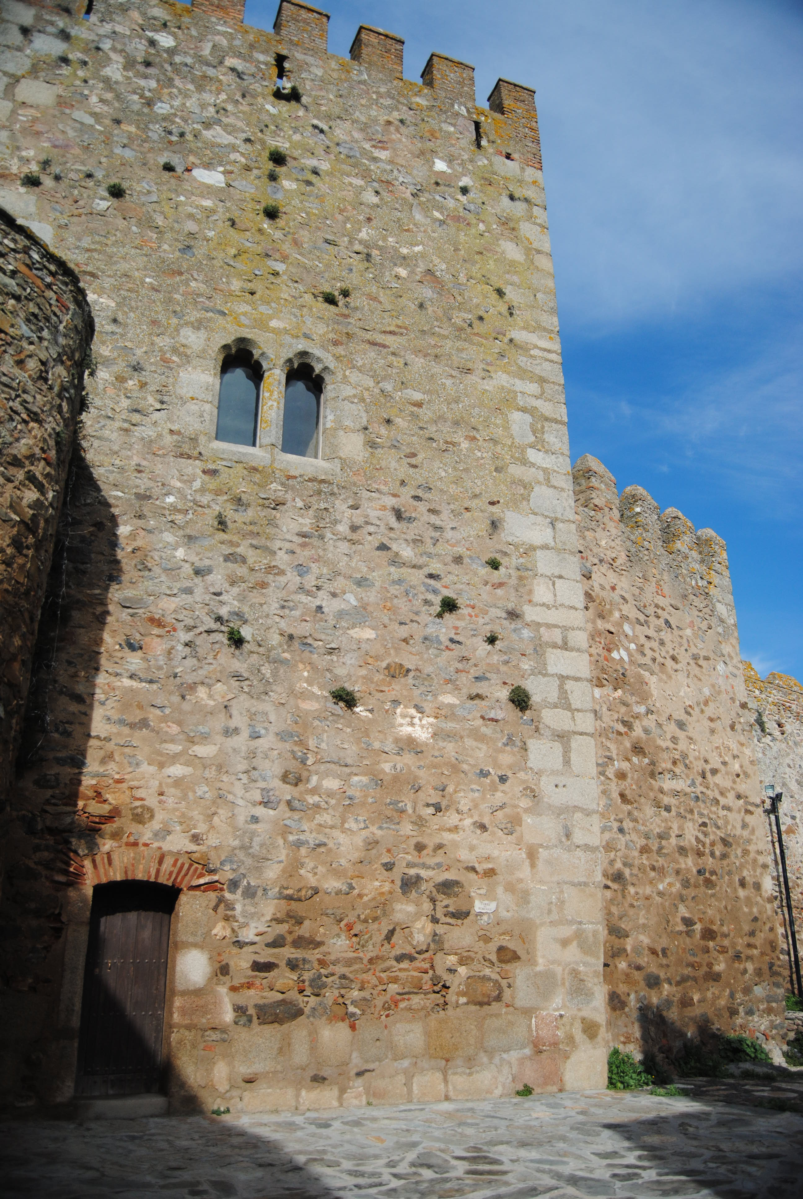 Segura de León, provincia de Badajoz, Extremadura, España.